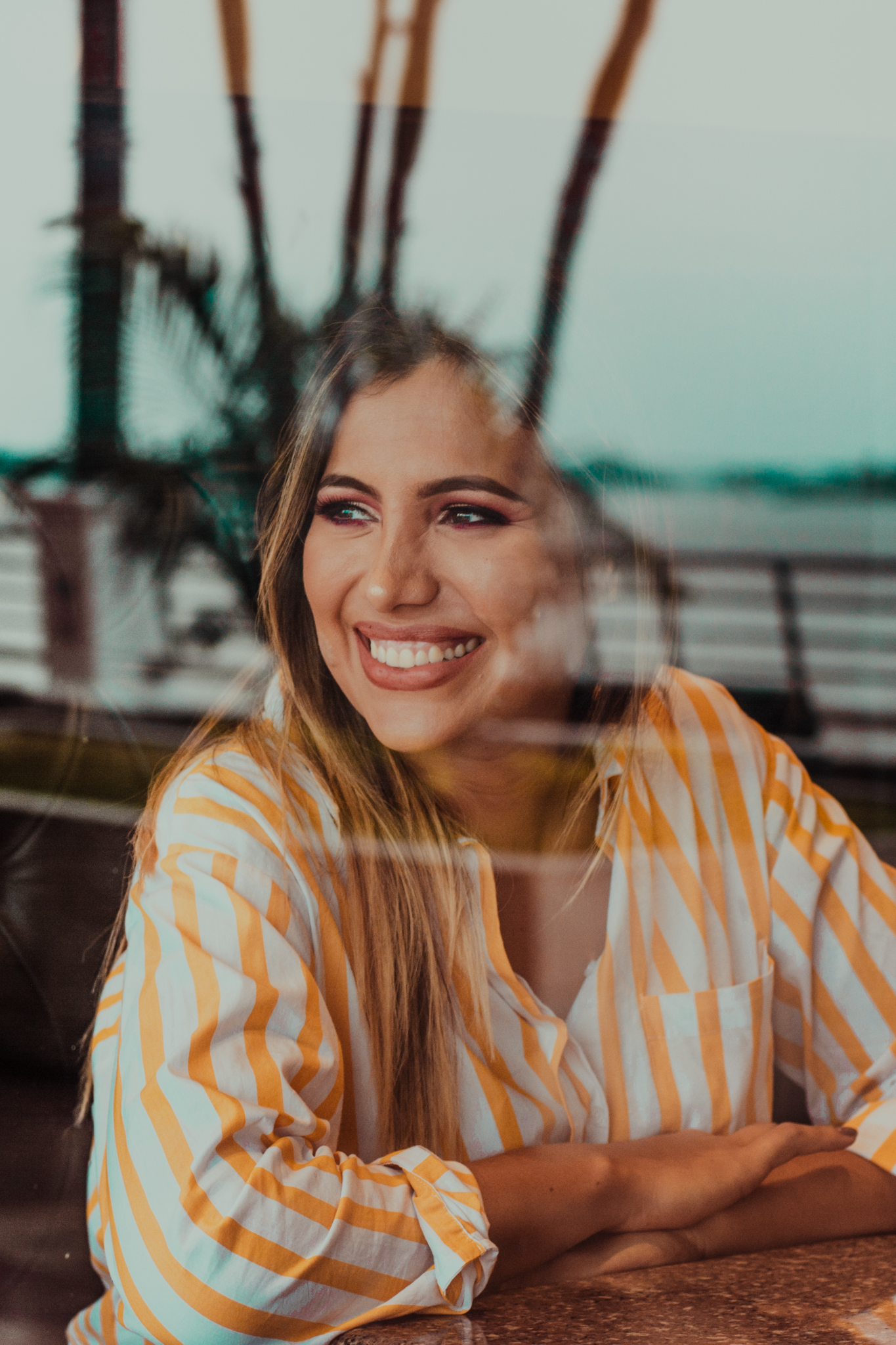 Michelle Medina Prado, comunicadora social y cantante ecuatoriana.